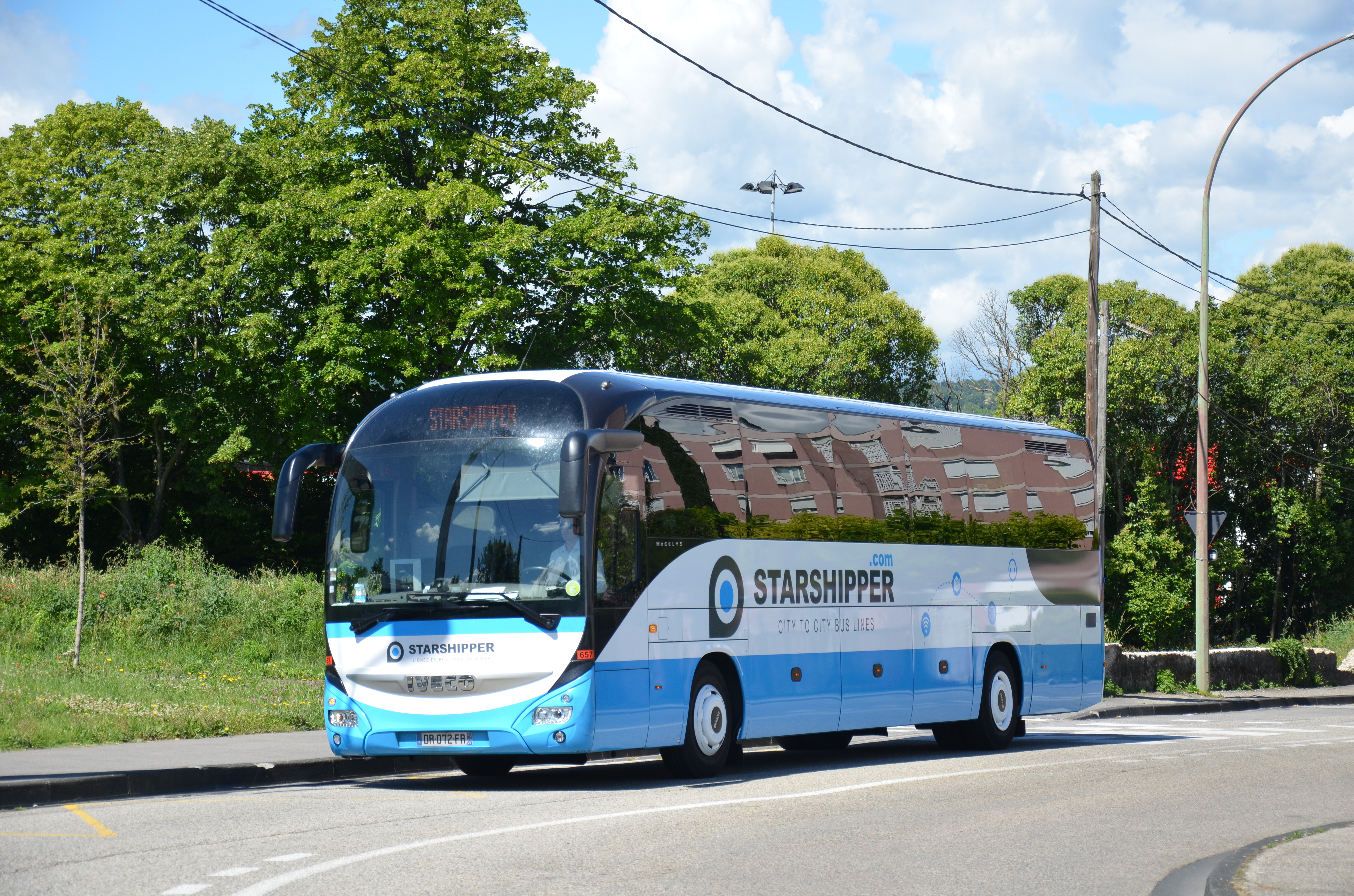 Iveco Magelys de la compagnie de transport par autocar longue Starshipper, à Valence.